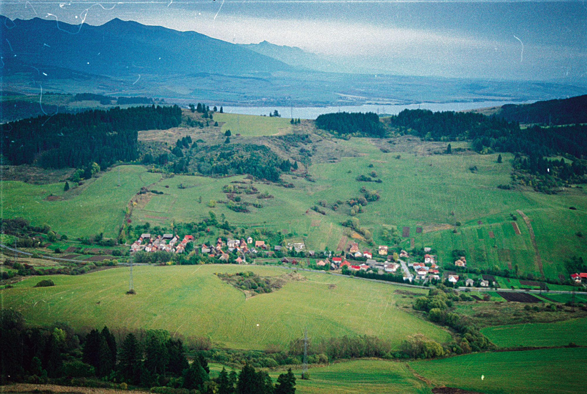 Potok_letecky